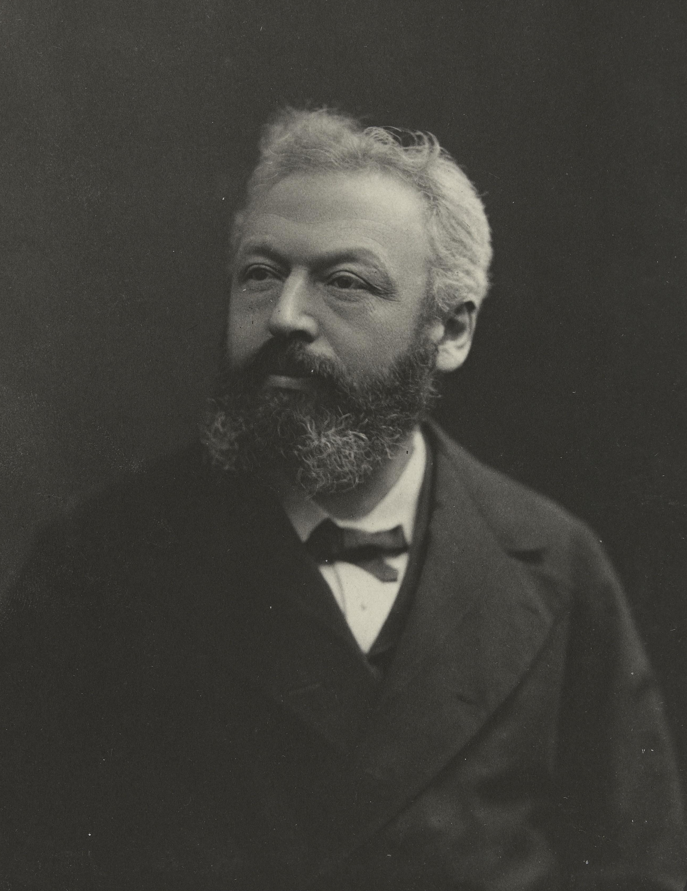 Nathan Narcisse Leven (1833-1915)